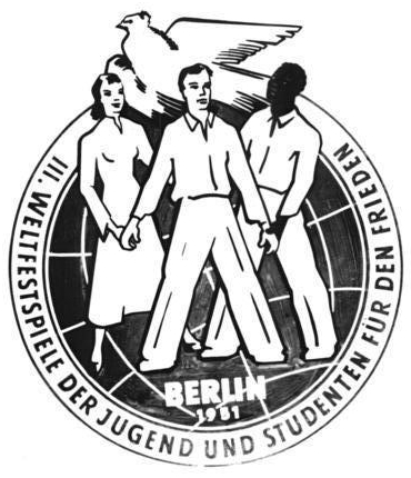 III. Weltfestspiele, Emblem ADN-ZB H.A.Sport 15.3.1951 Emblem zu den III.Weltfestspielen der Jugend und Studenten 1951 in Berlin.